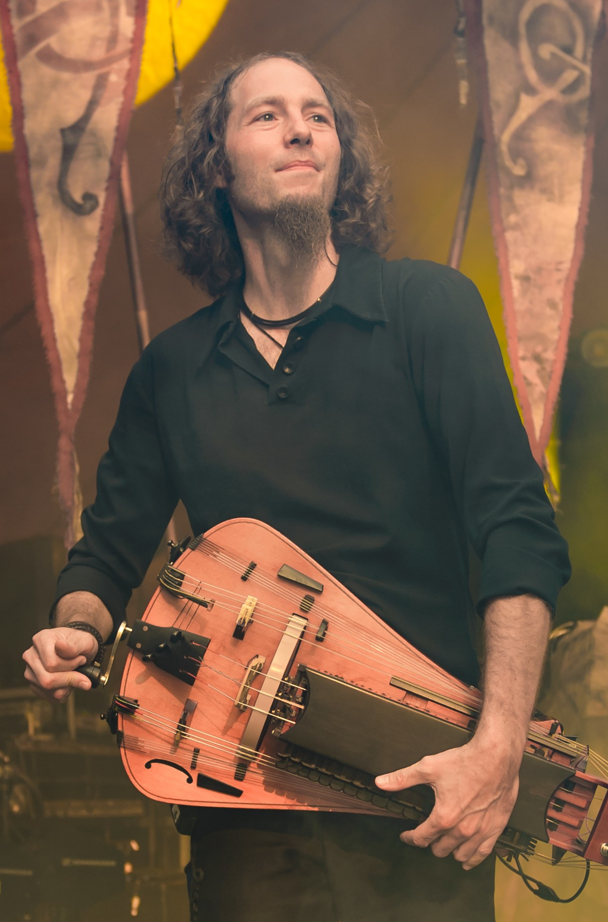 Stephan Groth